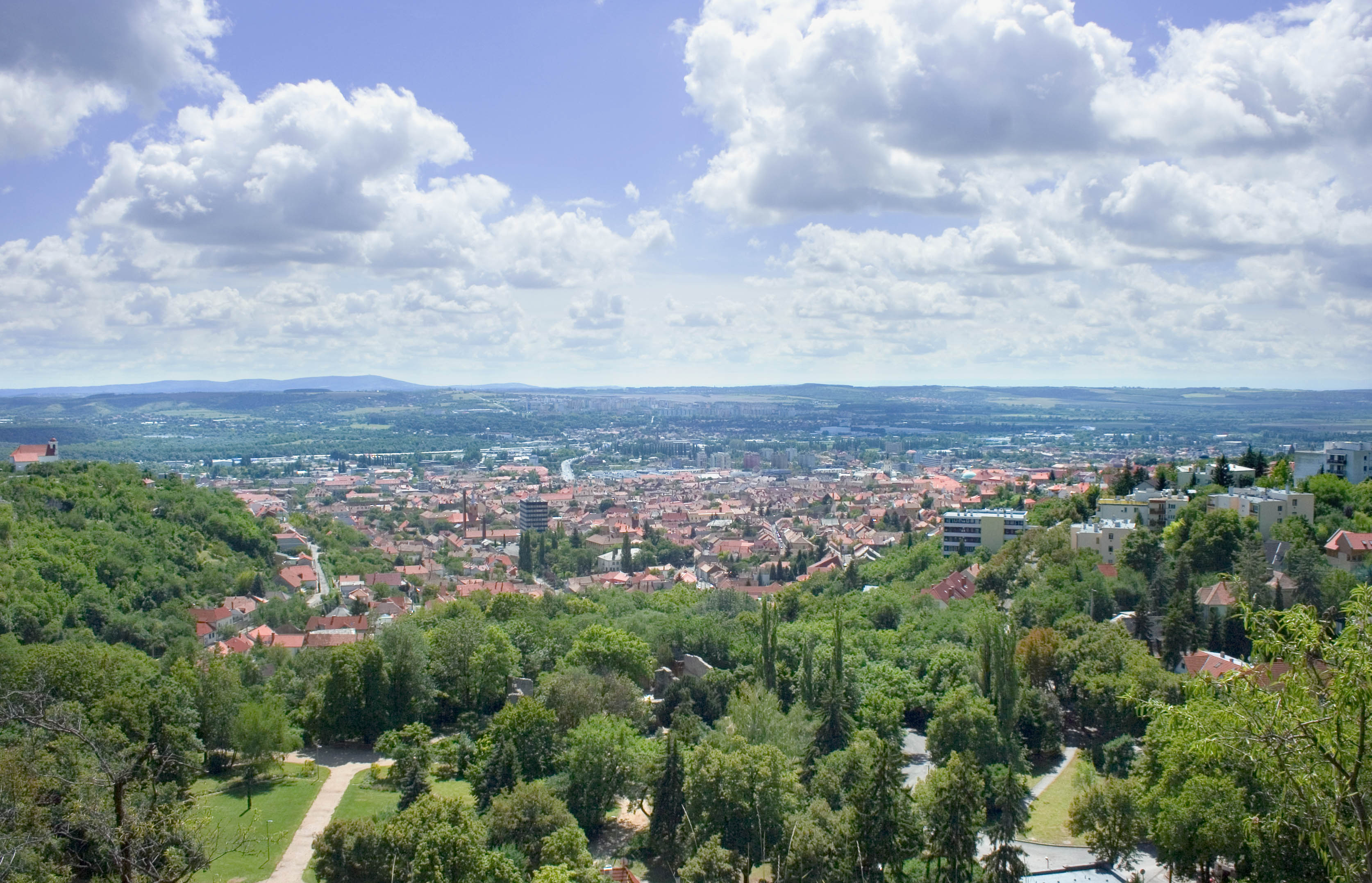 Pécs - a Tettye látképe